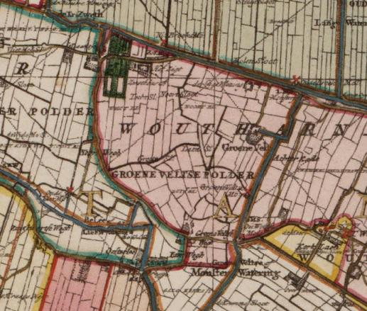 Groeneveldsepolder.